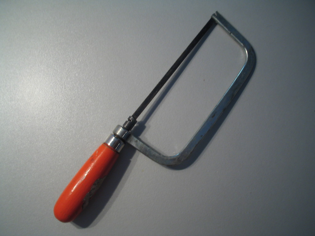 iron saw